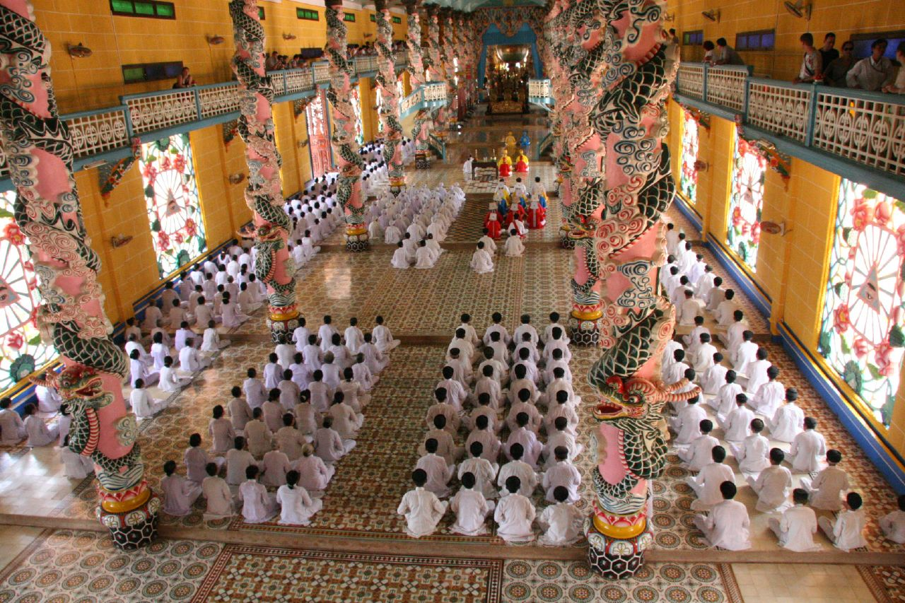 Cao Dai monks inside Cao Dai Holy See, Tây Ninh, Vietnam.